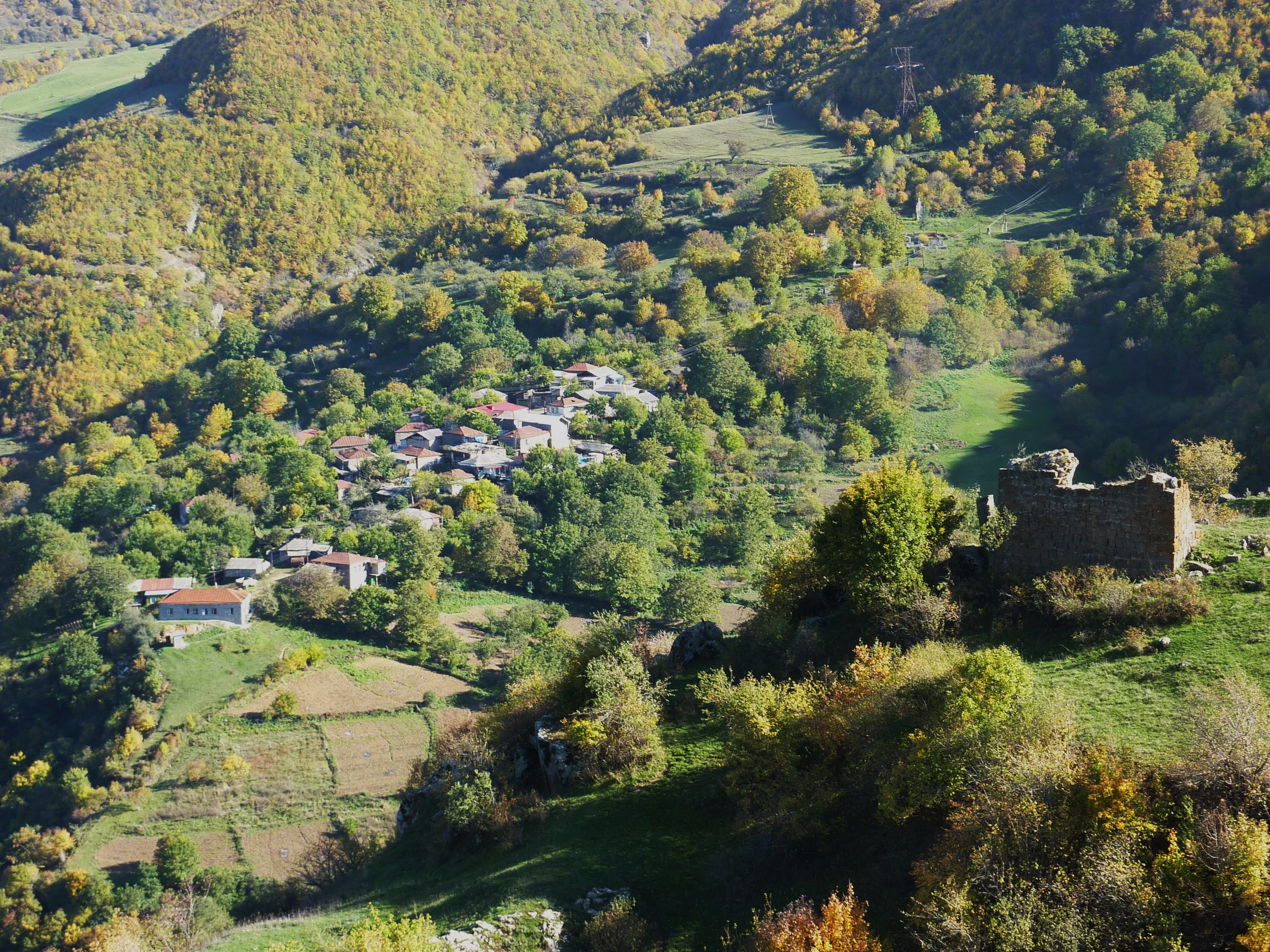 Un village situé à proximité du monastère de Tatév